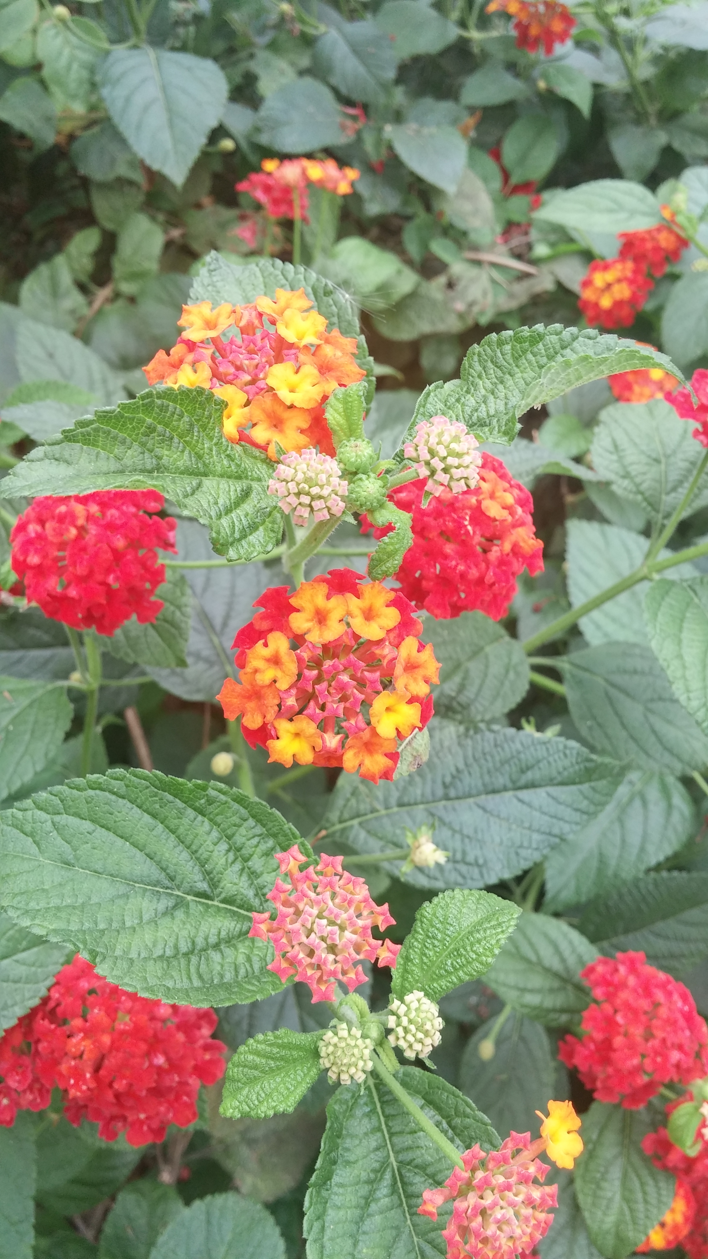 란타나 (Lantana) (5)